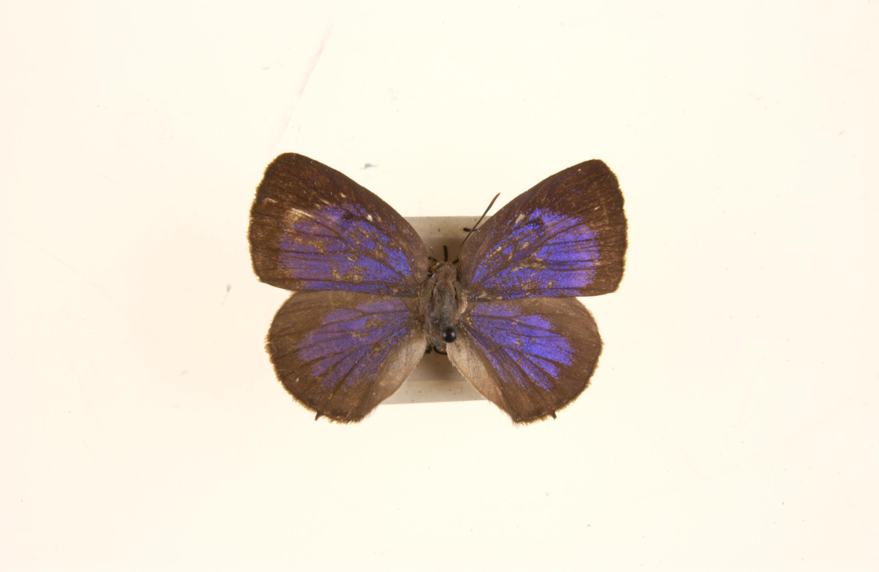 Arhopala ammon